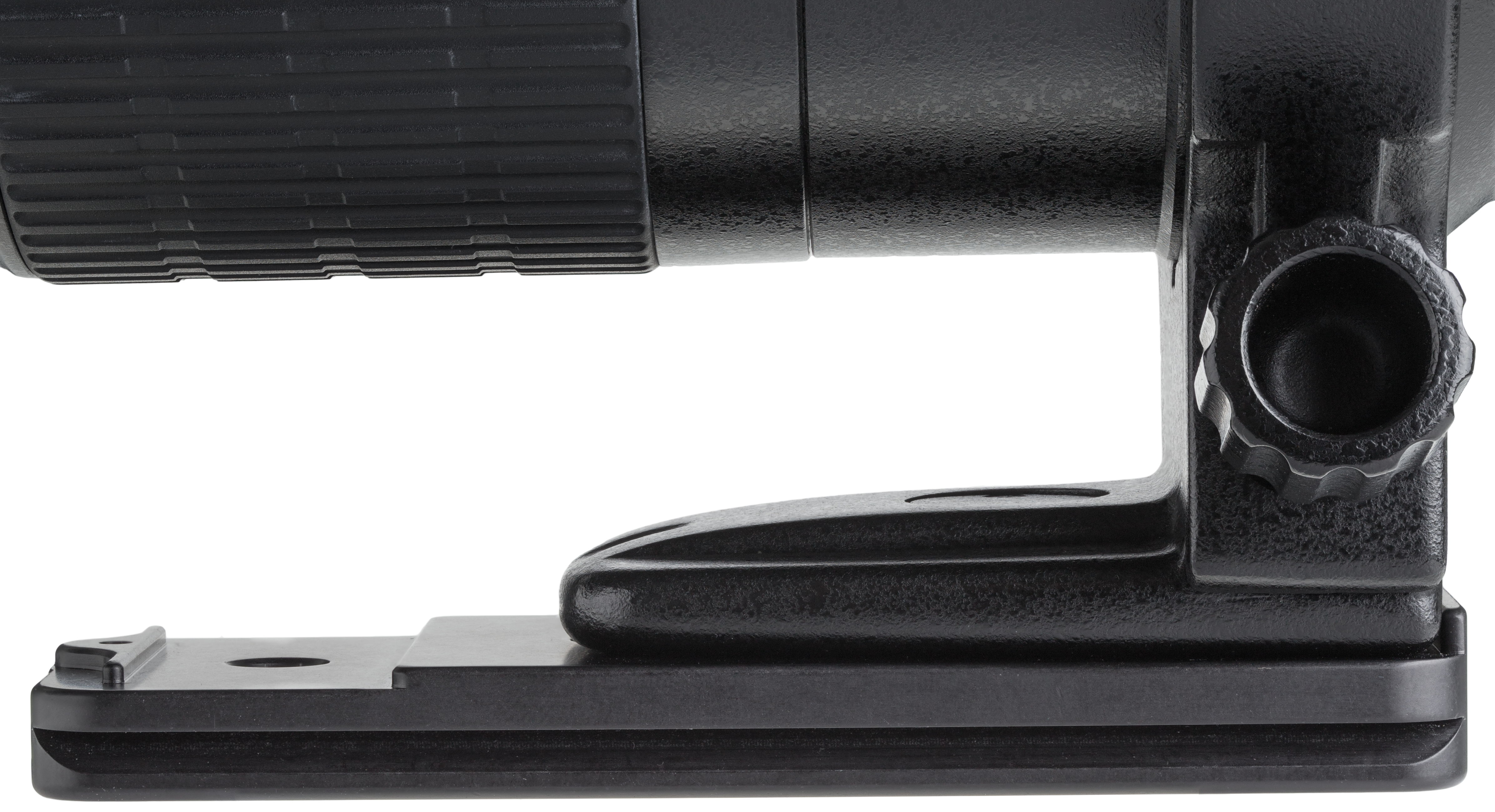 Kirk Schnellwechselplatte am Canon Stativring